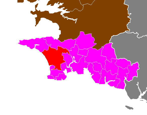 Maps of arrondissements and cantons of France: Arrondissement de Quimper - Canton de Plogastel-Saint-Germain.PNG (Département du Finistère , Arrondissement de Quimper)